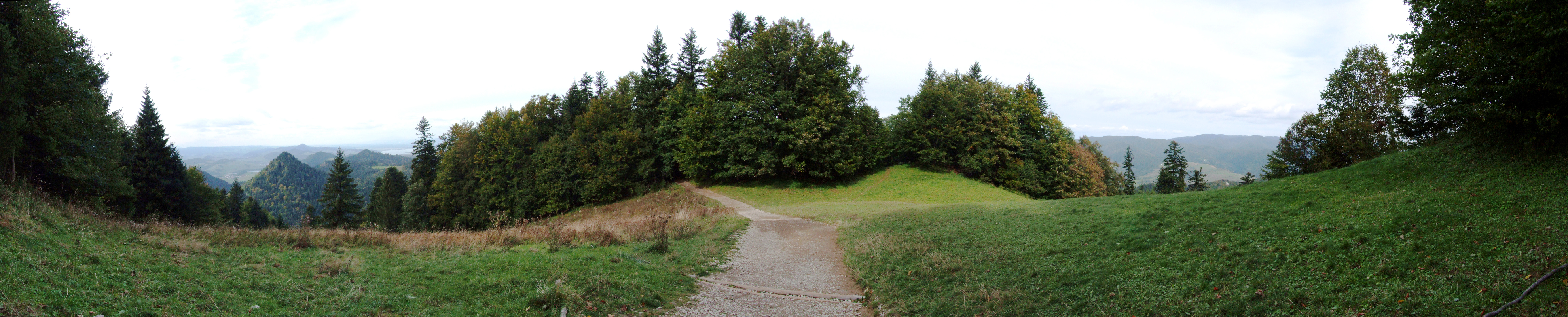 Polana Pieniny - panorama